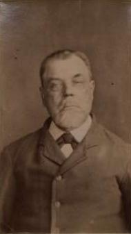 Per Pålsson från Frigivna straffarbetsfångar hos .